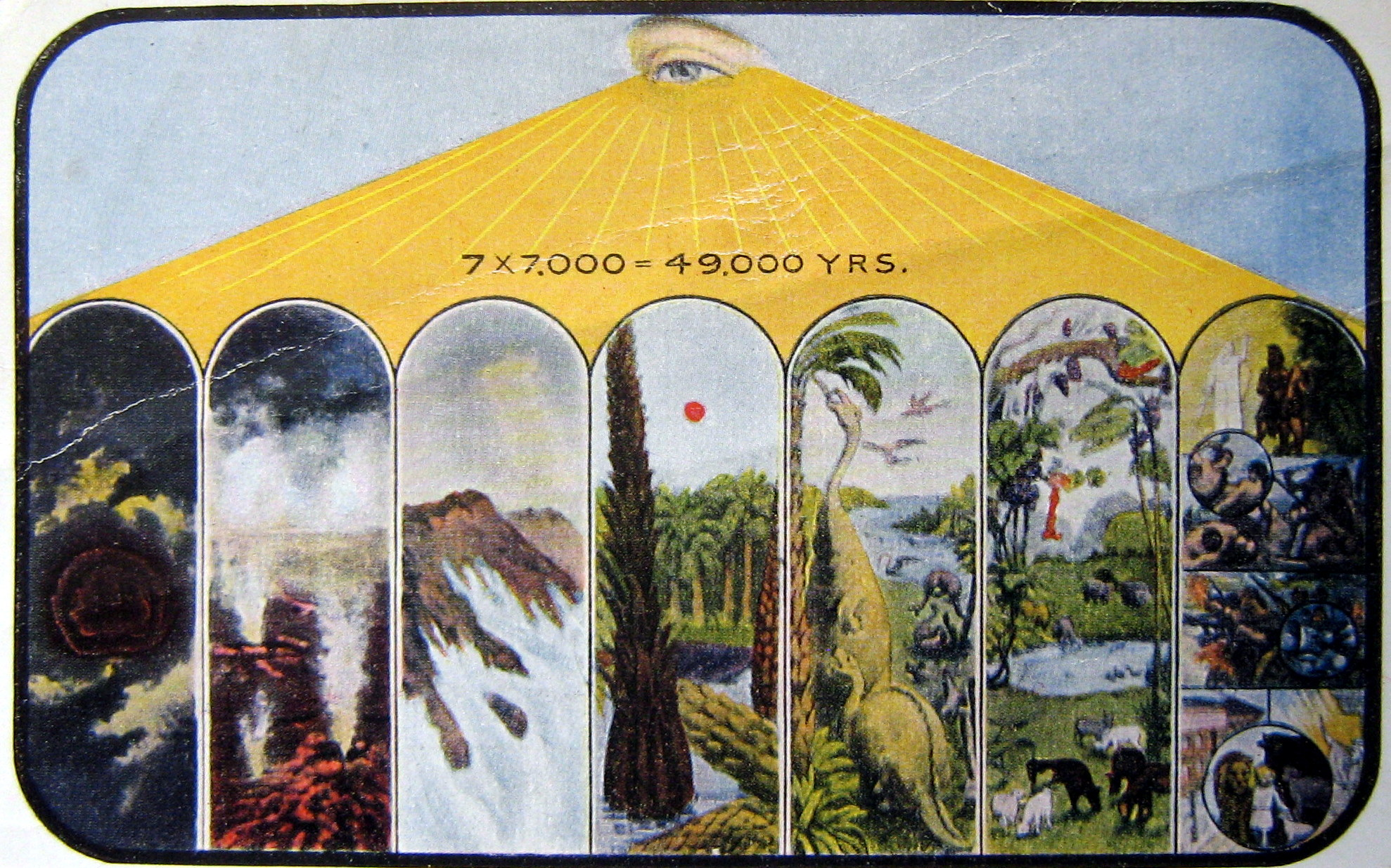 Vykort med illustration av Day-age kreationism.